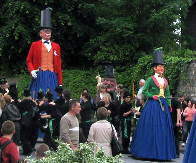 Ham (Somme, France) - Animation festive au centre-ville, un dimanche de printemps. Les géants Anatole et Grand-Père Guernouillard ont descendu la rue du Château et sont à l'angle de la rue de Noyon. Entre eux, on aperçoit un autre géant, bien plus petit et au visage monstrueux, L'Affreux Luquet.